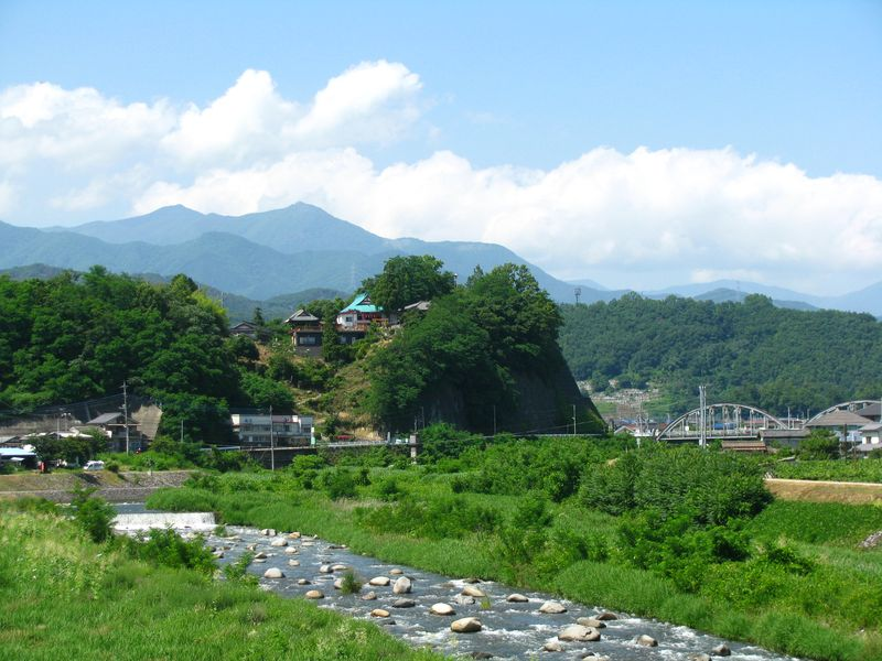 現代の差出の磯